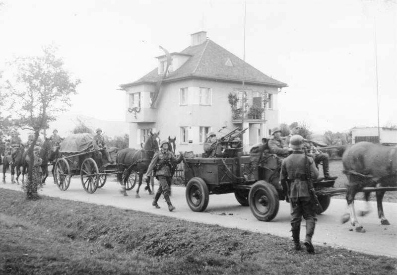 Einmarsch in das Sudetenland. Truppe auf dem Vormarsch (Gefechtstross). 5.10.1938 Abschnitt Kreuzbuche. Sudetenland